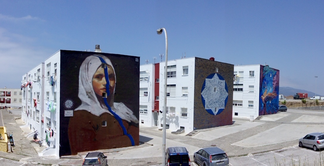 Vista de los murales desde la carretera Cádiz-Málaga en Tarifa (España). Julio de 2014.